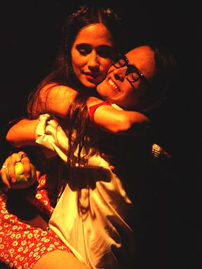 Foto de la obra "Angelitos Empantanados" de Andres Caicedo